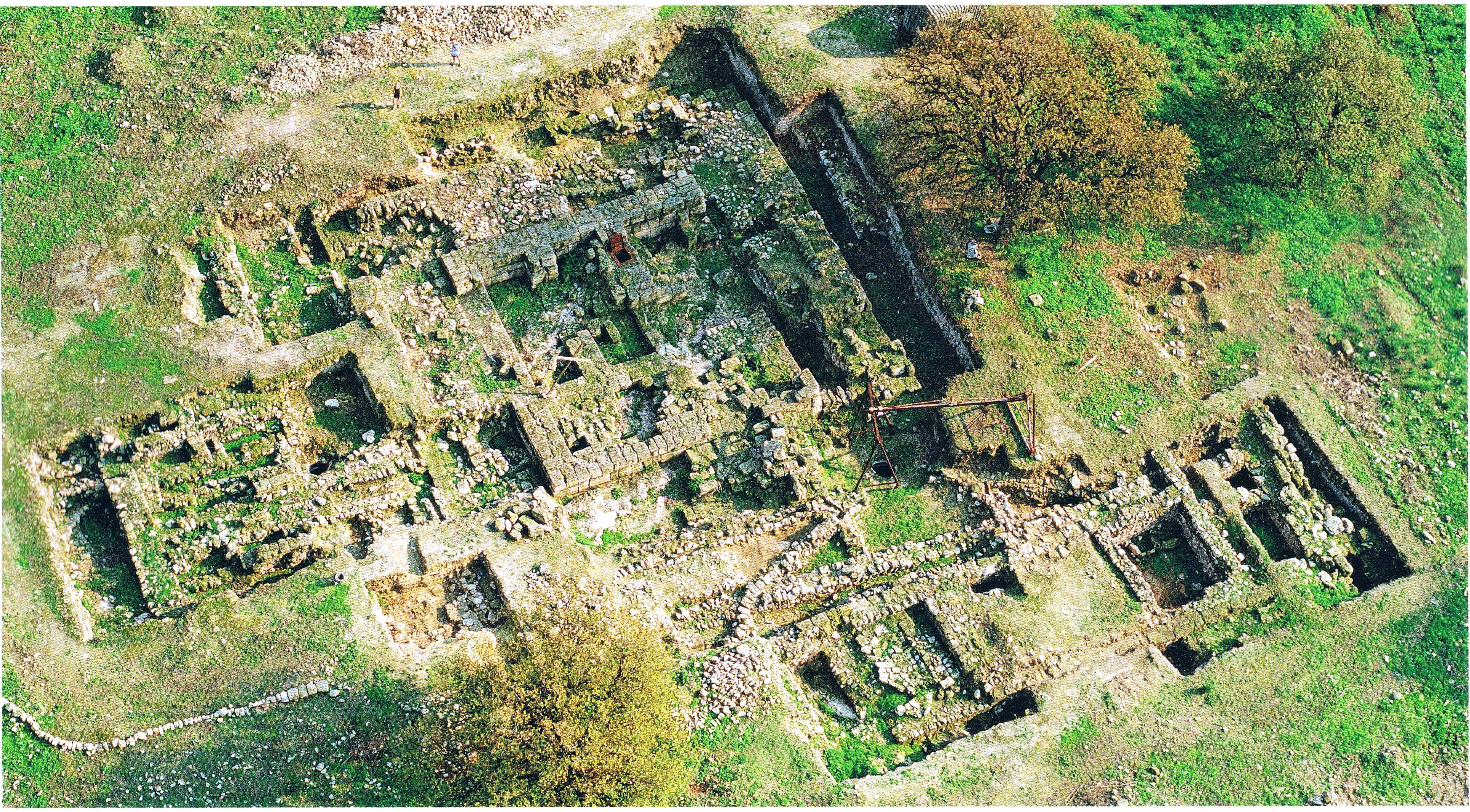 פתח הכניסה למערכת המים התת קרקעית במצד שער העמקים